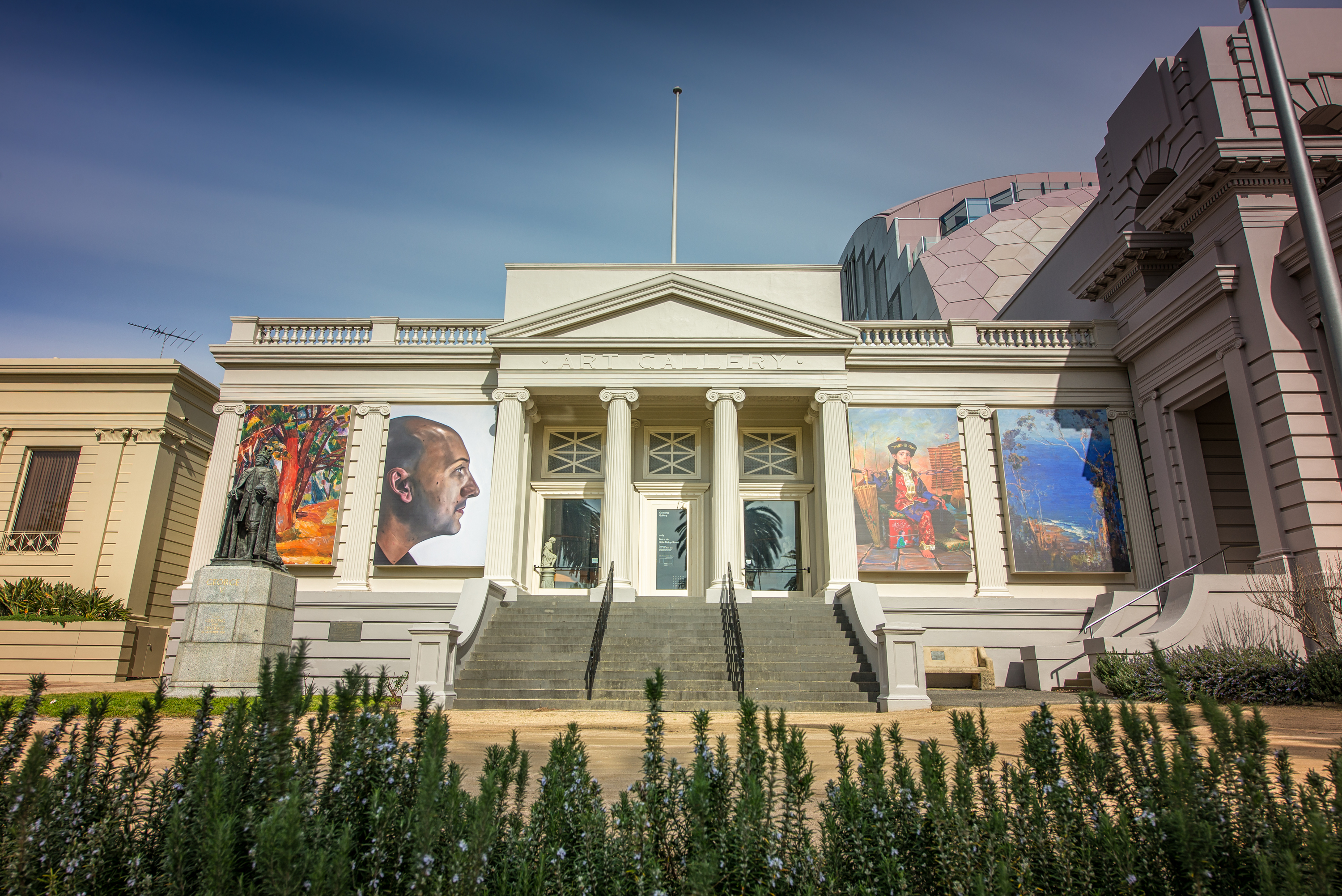 中文（中国大陆）: 季隆美術館